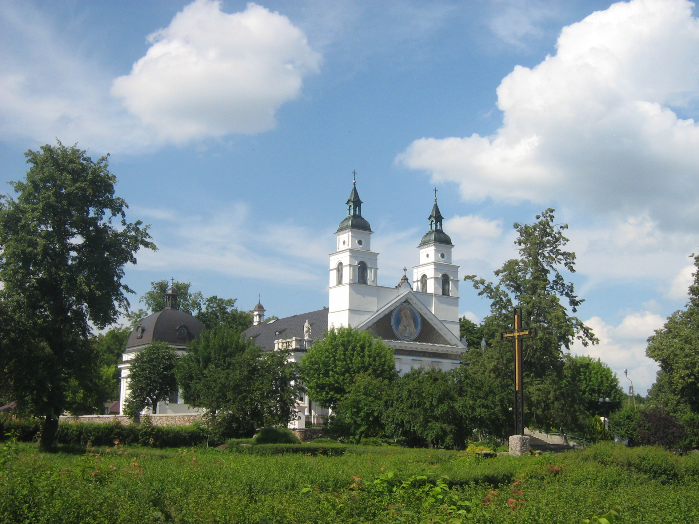 Kościół św. Antoniego w Sokółce